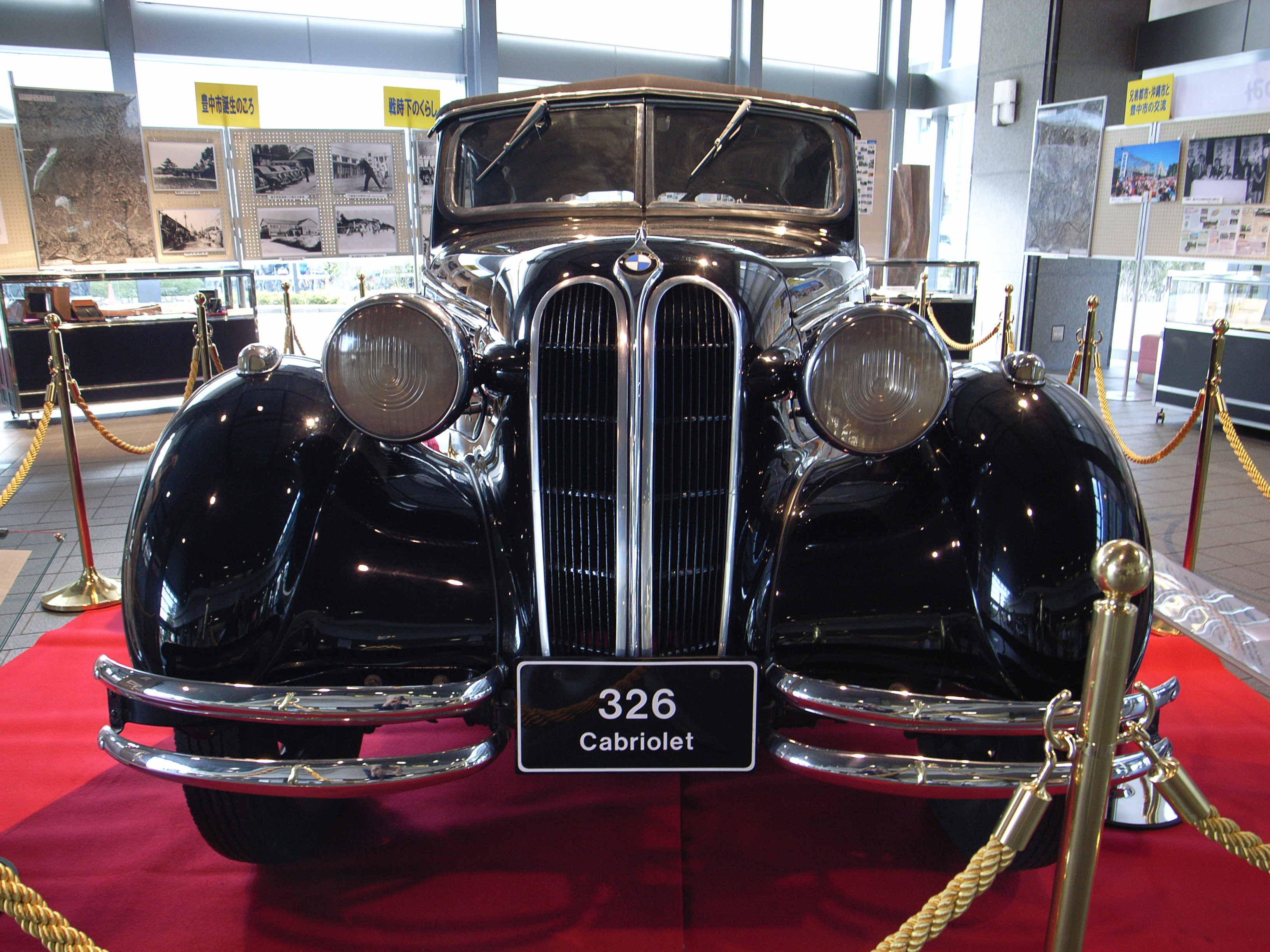 BMW 326 Cabriolet, 1936 1971 cc WC L6 OHV